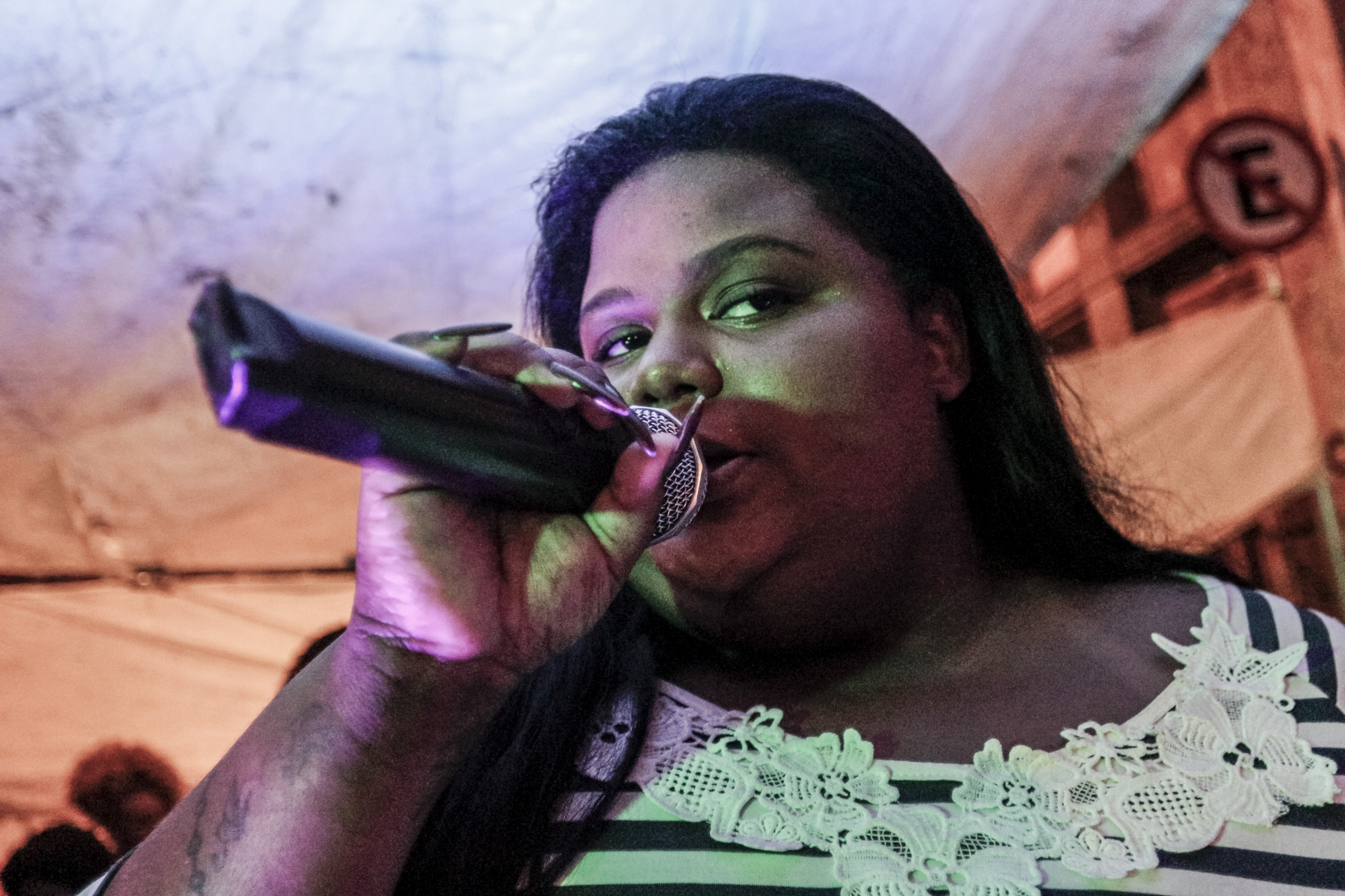 MC Carol durante o evento "Cisheterofobia Existe - A FESTA - MC Linn da Quebrada & MC Carol" no dia 1º de abril de 2017 - (RJ). Brasil.